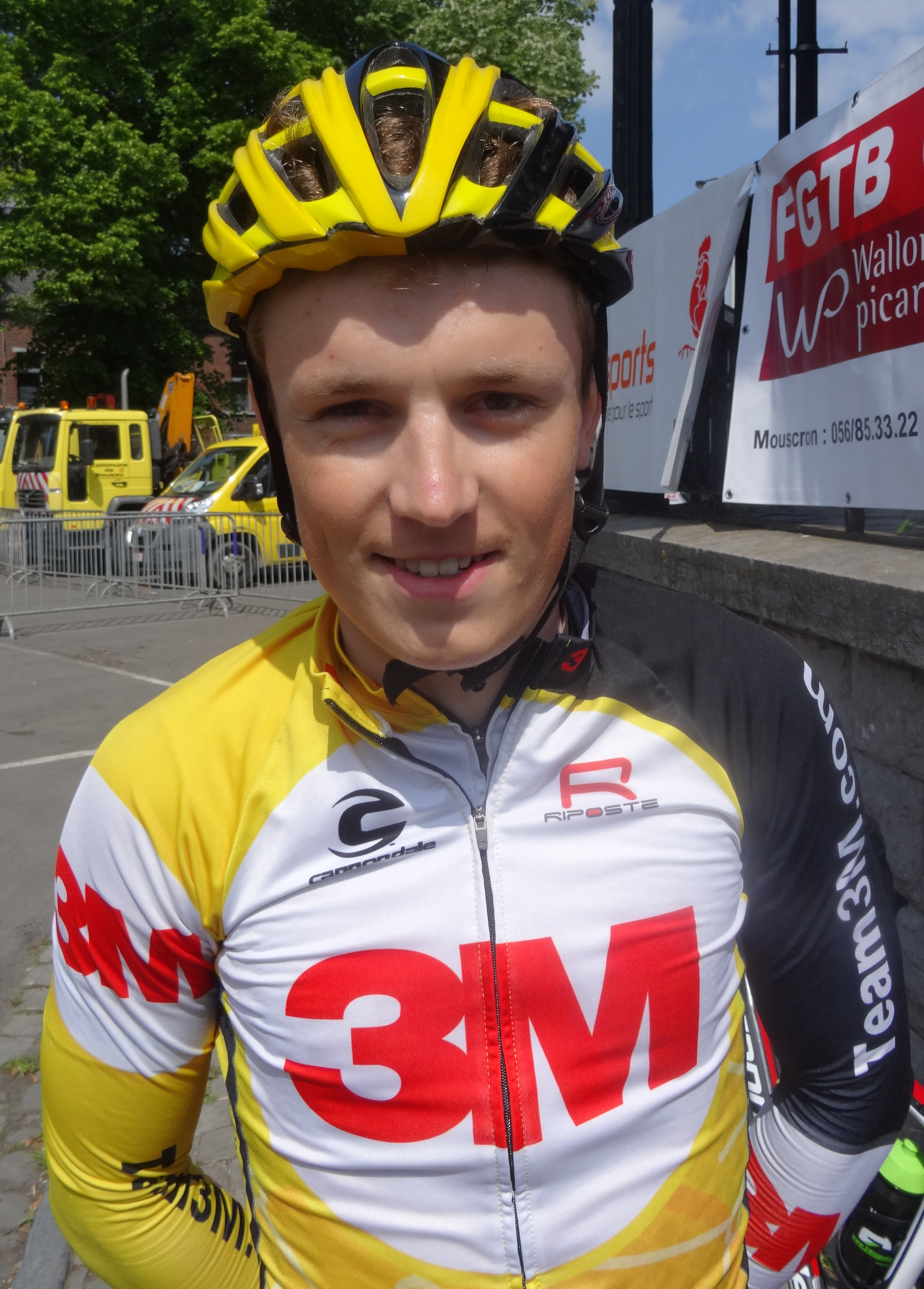 Reportage réalisé le samedi 17 mai à l'occasion du départ du Grand Prix Criquielion 2014 à Boussu, Belgique.